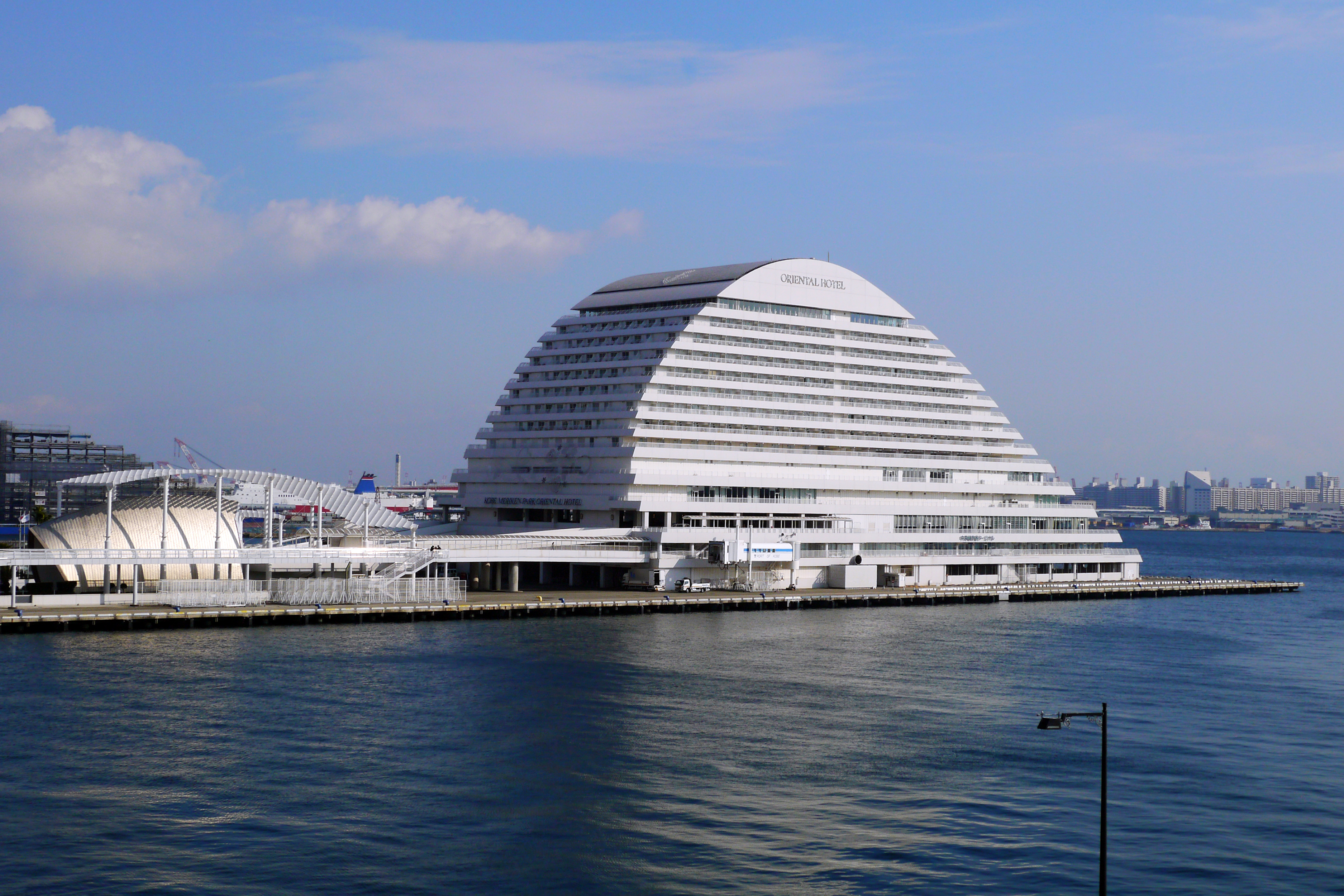 Kobe Meriken Park Oriental Hotel (神戸メリケンパークオリエンタルホテル), Kobe, Hyogo prefecture, Japan